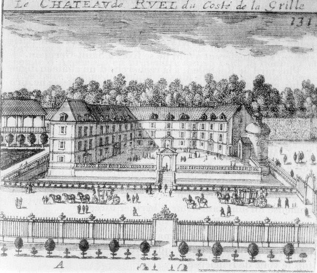 Château du Val de Ruel vu du côté de la grille - Rueil-Malmaison - à l'époque de Richelieu